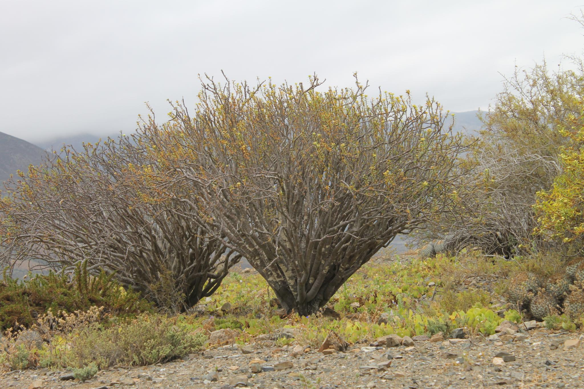 Quebrada Rinconada Paposo